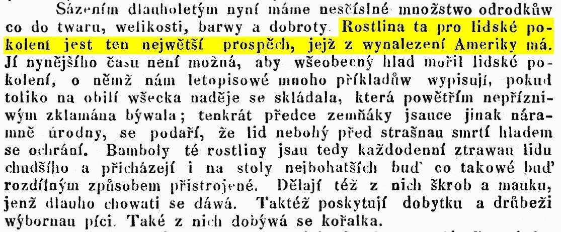 Odstavec textu z knihy: Presl: Všeobecný rostlinopis, Praha, 1846